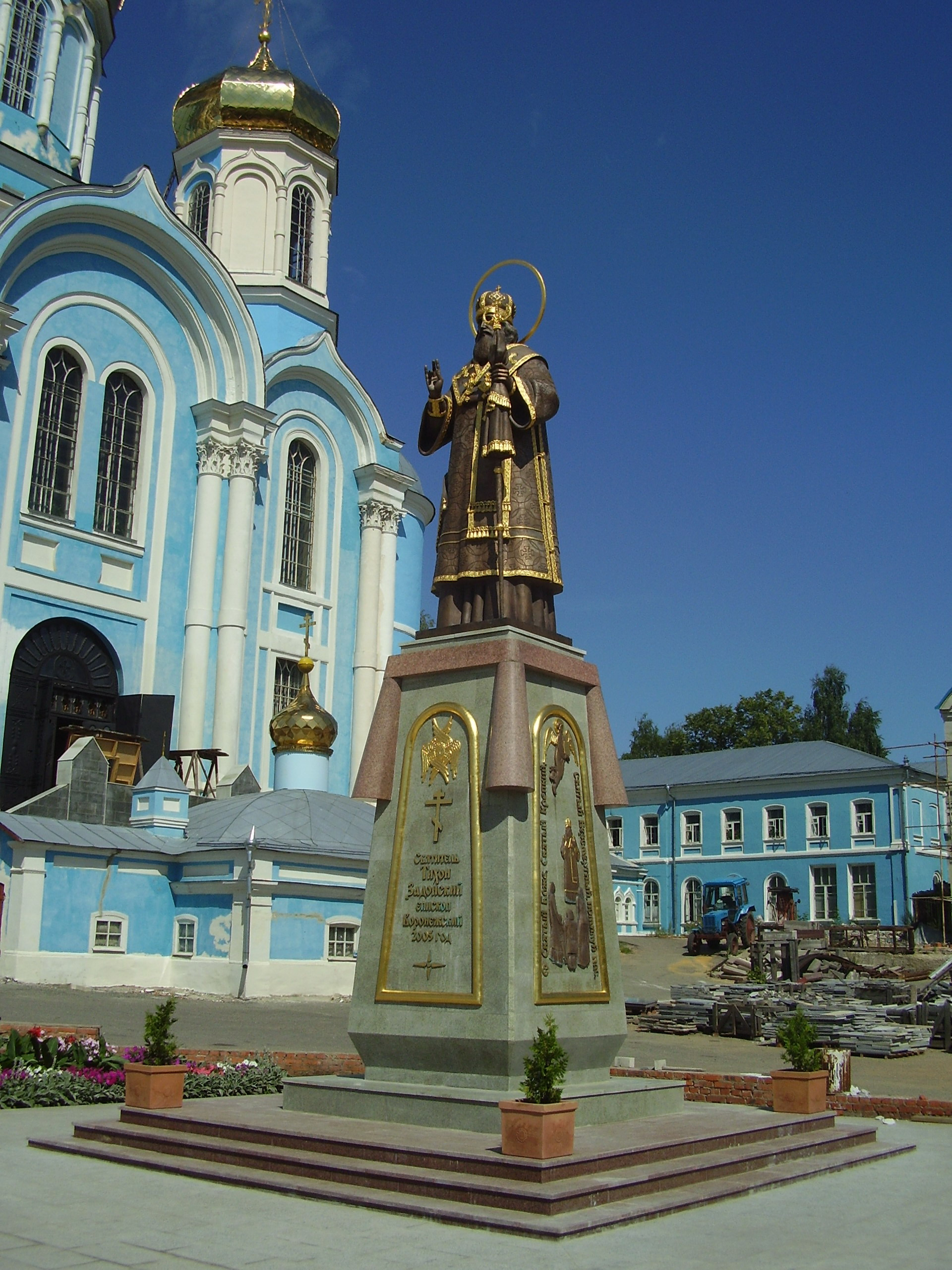 Задонск, памятник Тихону Задонскому в Свято-Тихоновском (Рождество-Богородицком) монастыре